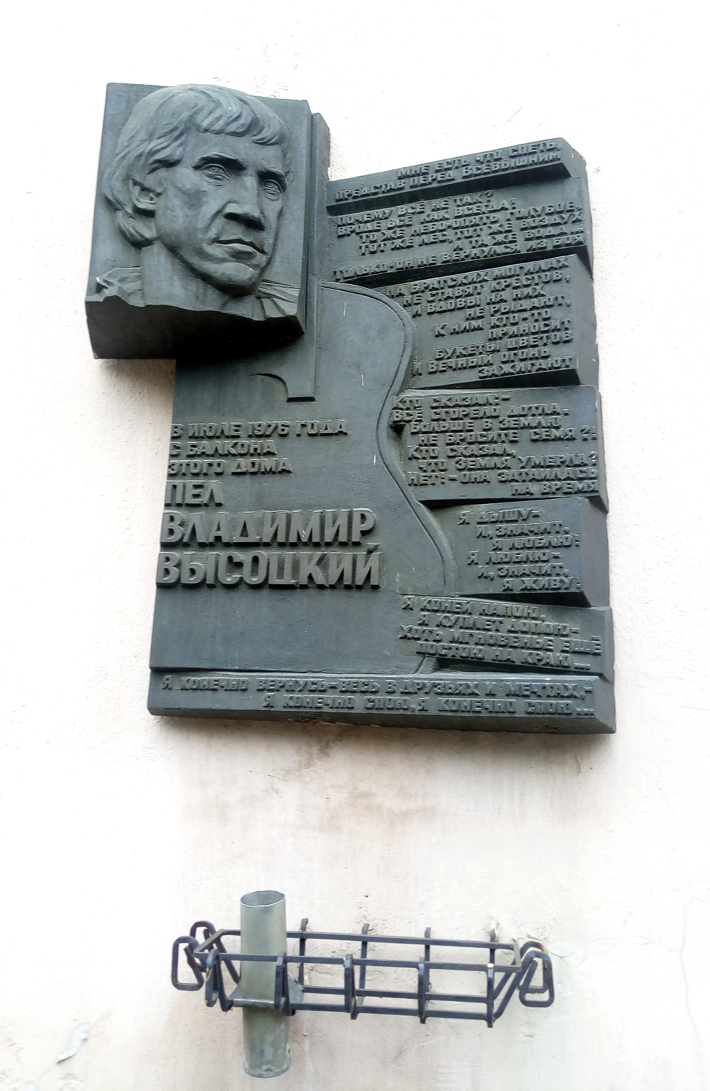 Мемориальная доска Высоцкому в Иркутске на доме 32 по улице Сибирских партизан.